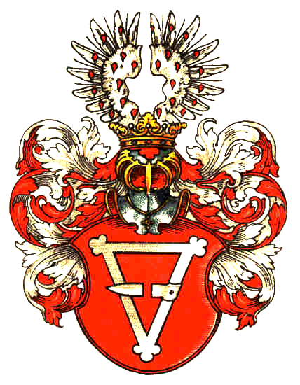 Wappen der Familie von Zedlitz und Leipe.